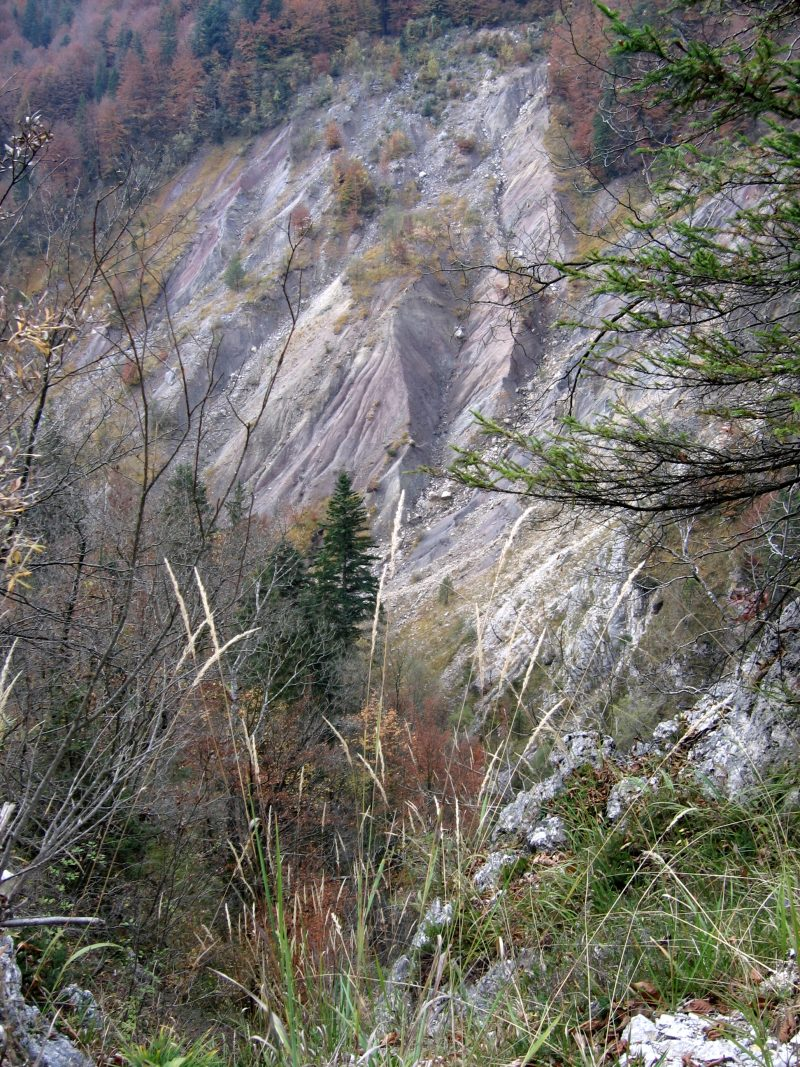 Tratnikovi usadi